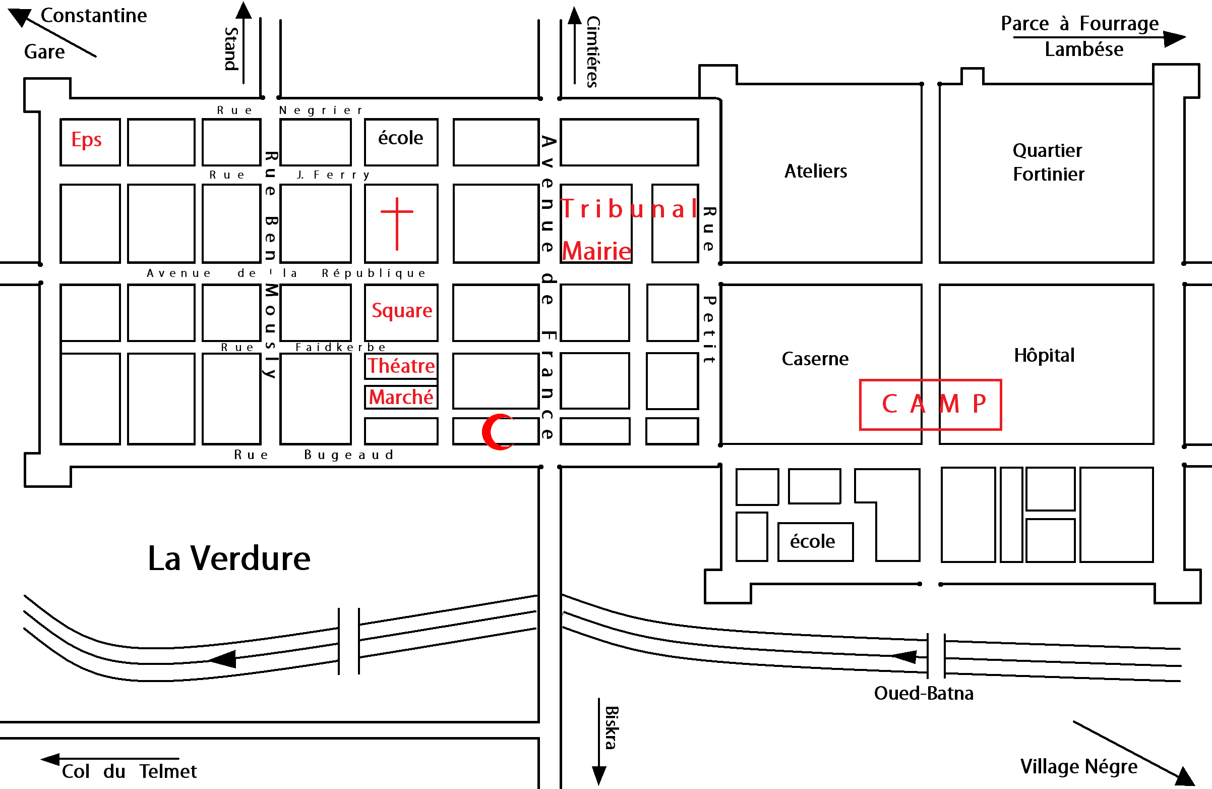 un plan de la ville de Batna dans le période du développement de la ville